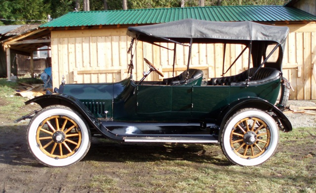 1915 McLaughlin